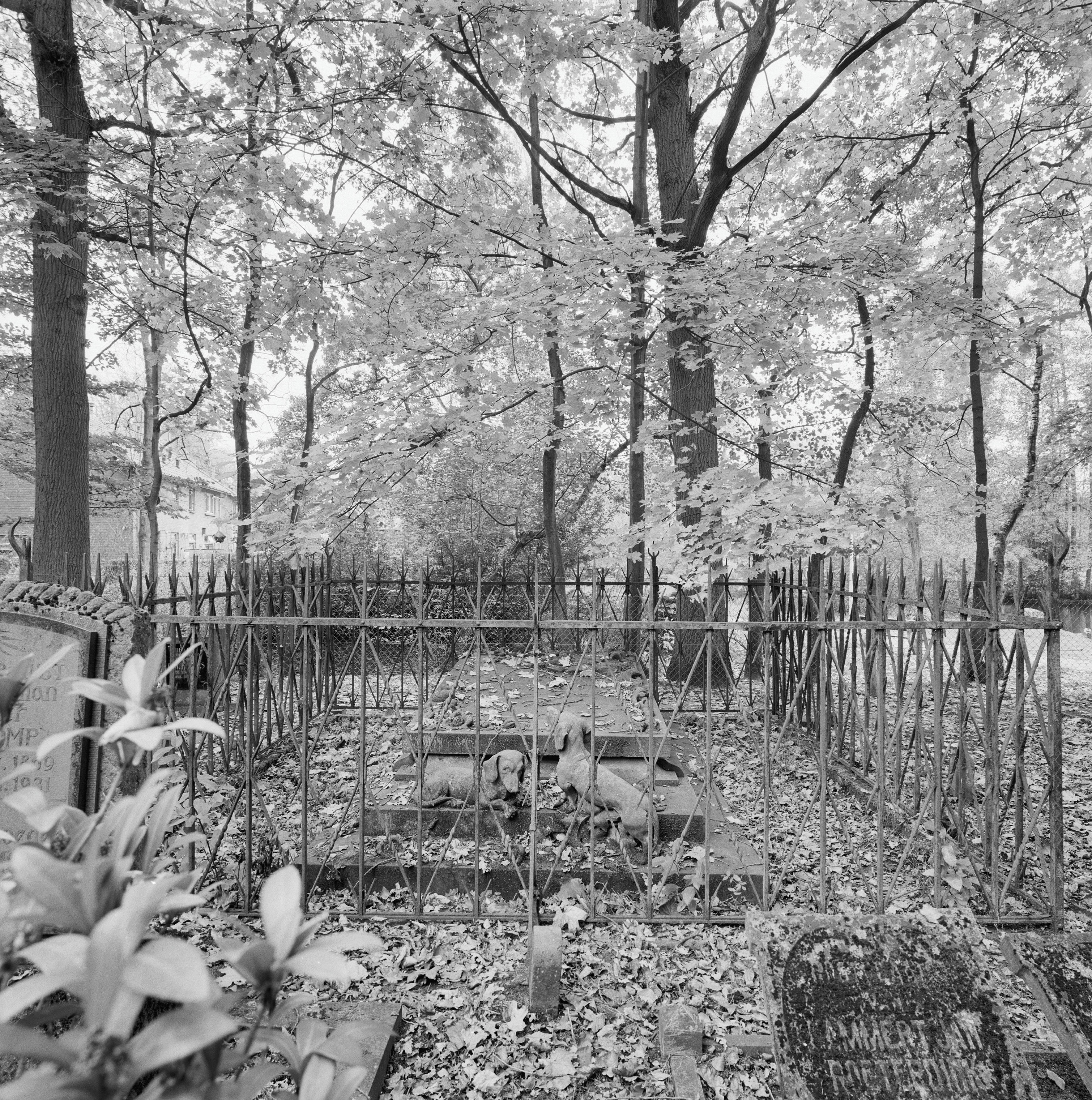 Algemene begraafplaats: Overzicht grafmonument met gebeeldhouwde honden van Cécile Smissaert (opmerking: Gefotografeerd voor Monumenten In Nederland Overijssel, bladzijde 132)